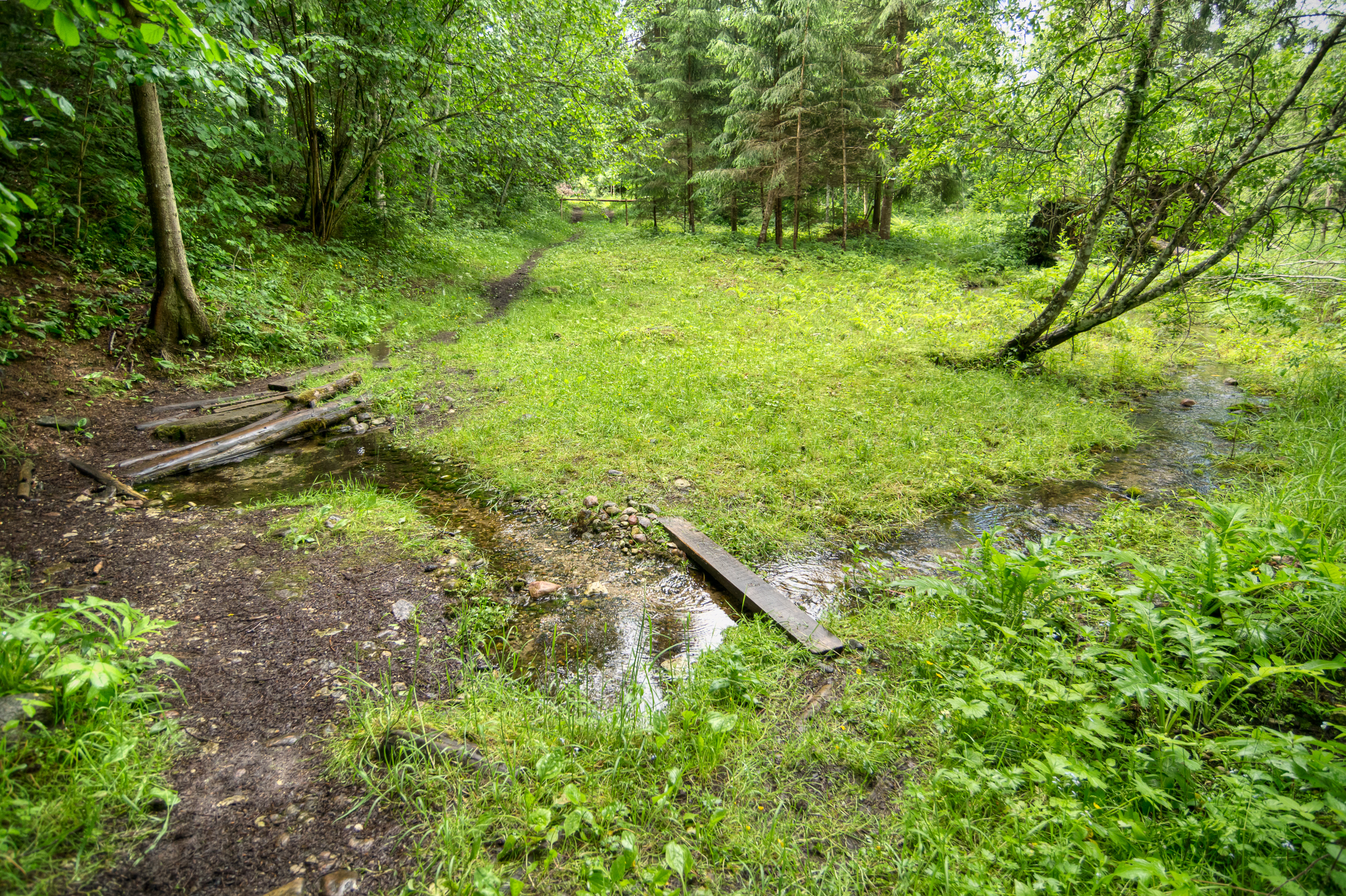 Allikas Kolli Nuudaläte